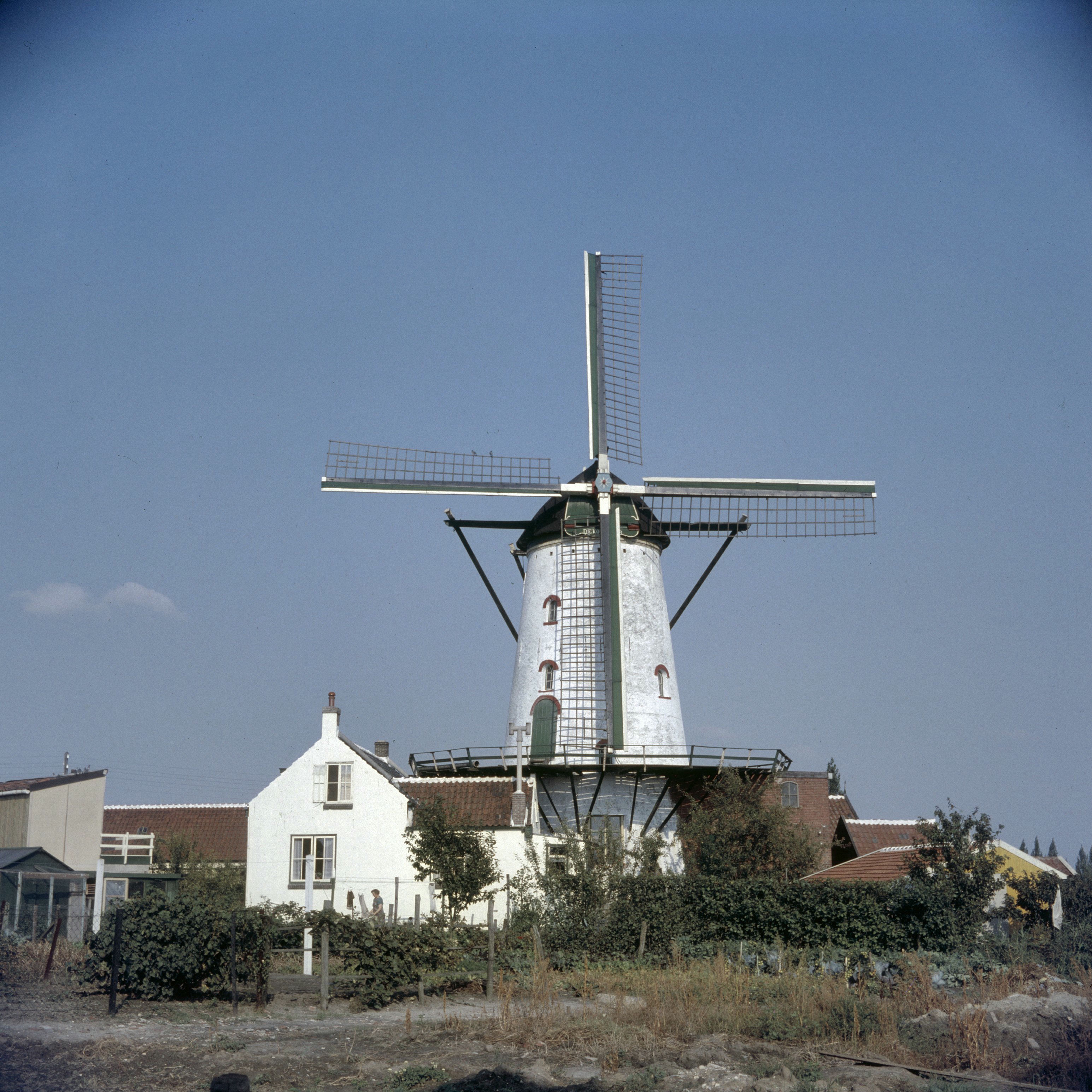 De Korenaar: Overzicht (opmerking: Diacollectie Molens)